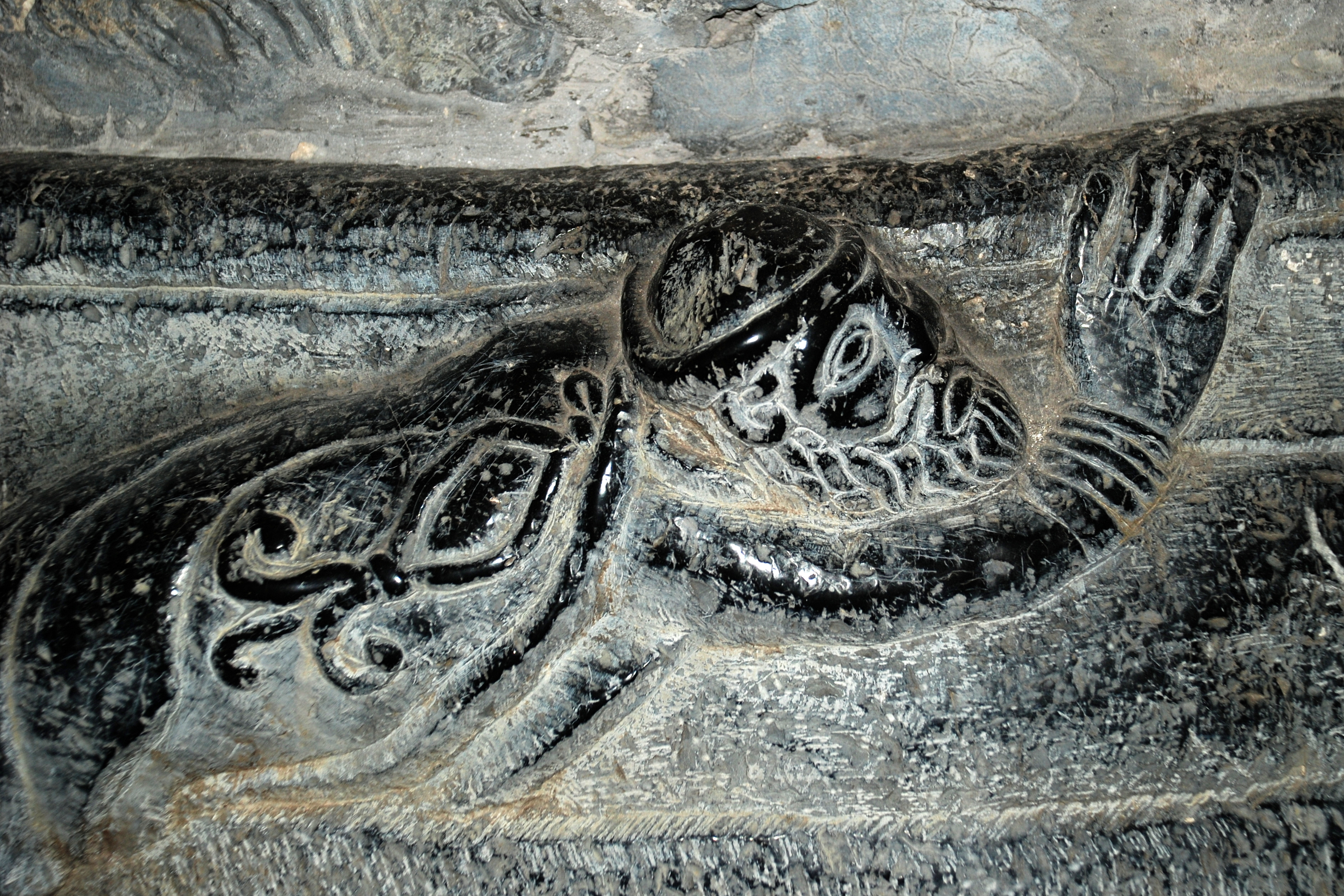 Belgique - Province de Namur - Fonts baptismaux de Furnaux - Abraham prosterné